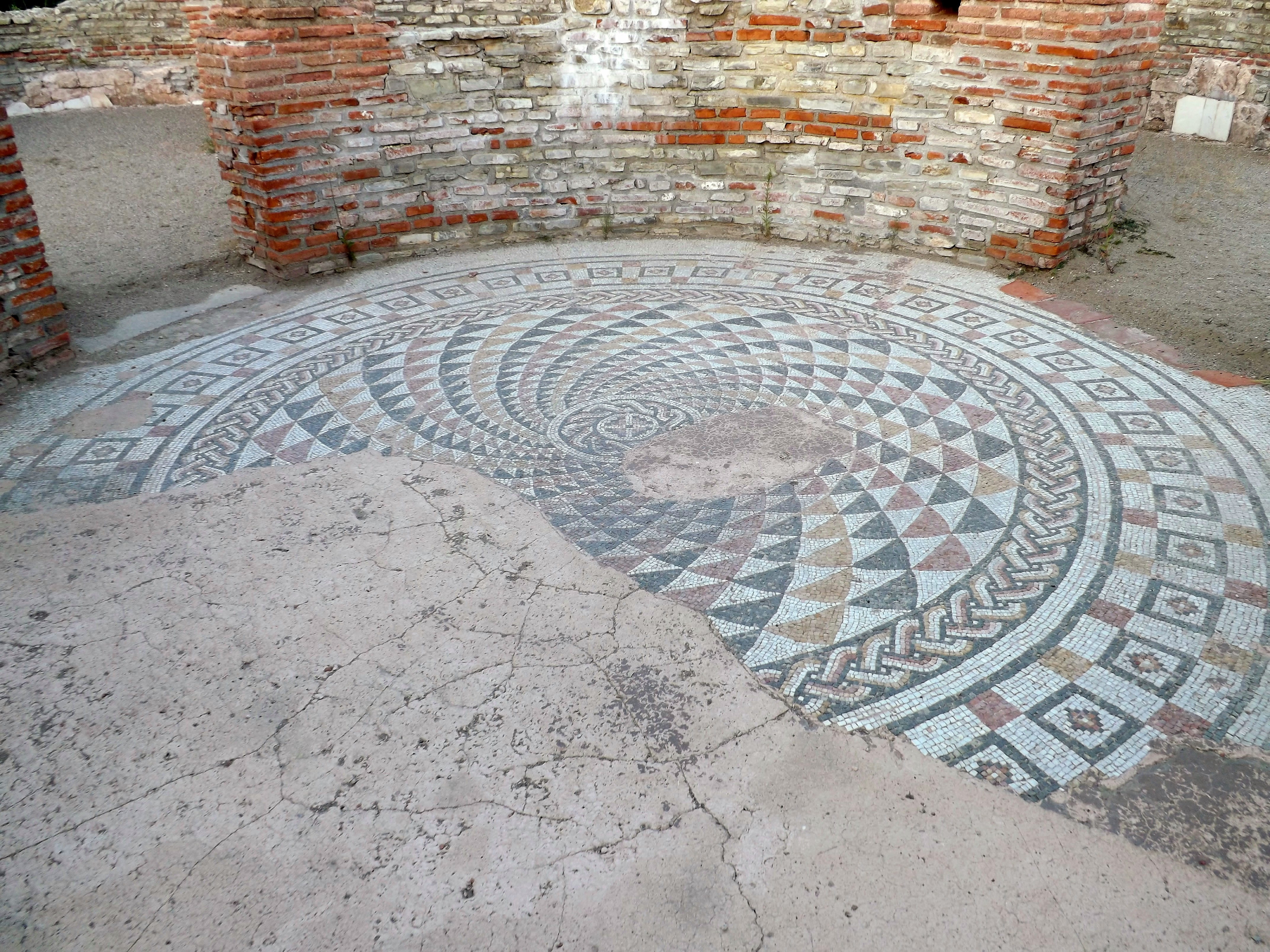 Gamzigrad (srpski: Гамзиград; latinski: Felix Romuliana) je arheolosko nalaziste u Istocnoj Srbiji koje se nalazi u blizini grada Zaječara. Ovo je deo otkrivenog mozaika na Feliks Romulijani.